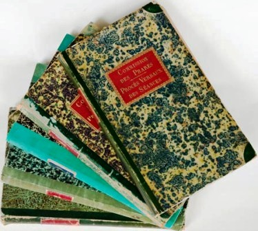 Registres de la Commission des phares